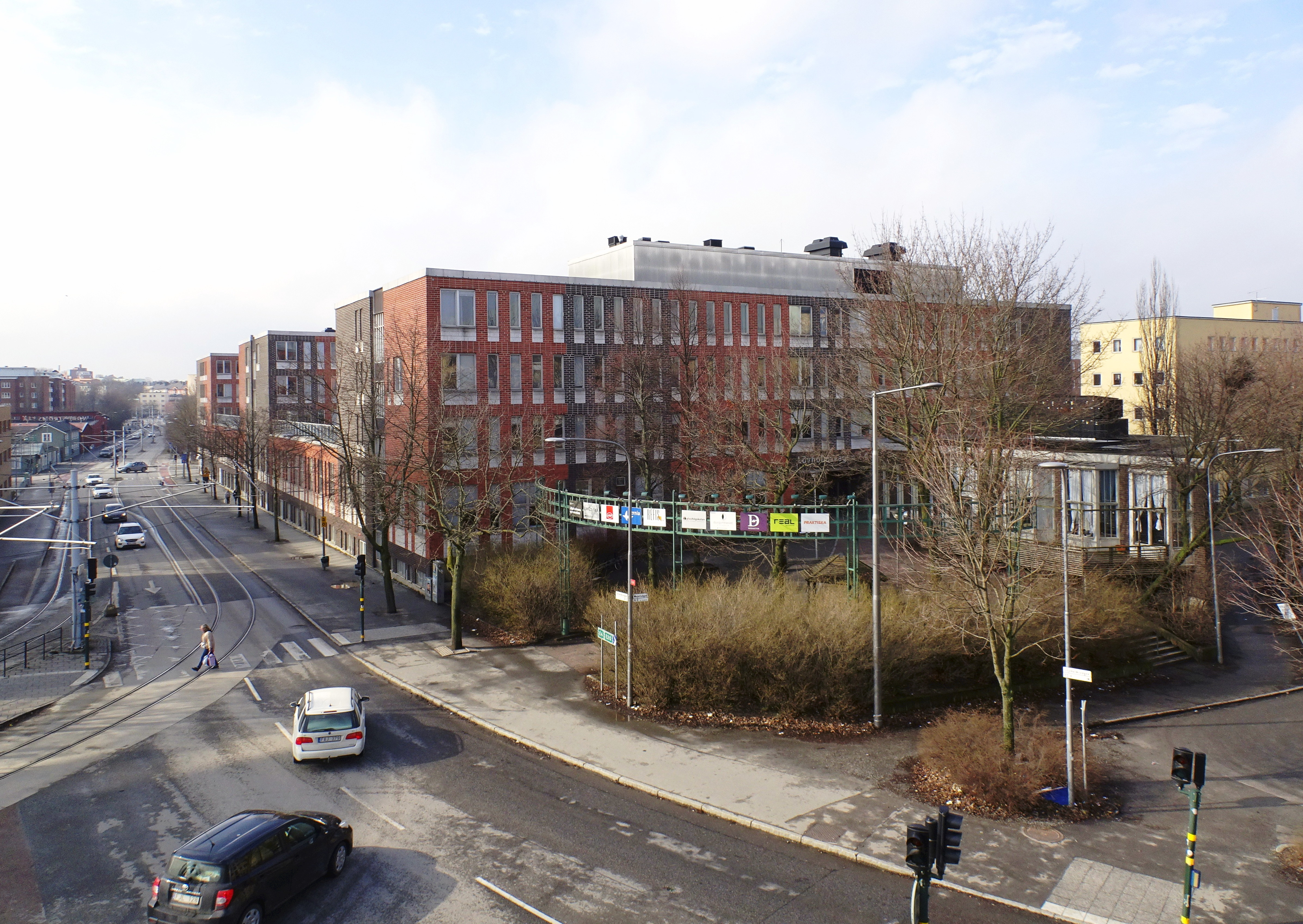 Tryckeriet 14, Liljeholmen, arkitekt Backström & Reinius